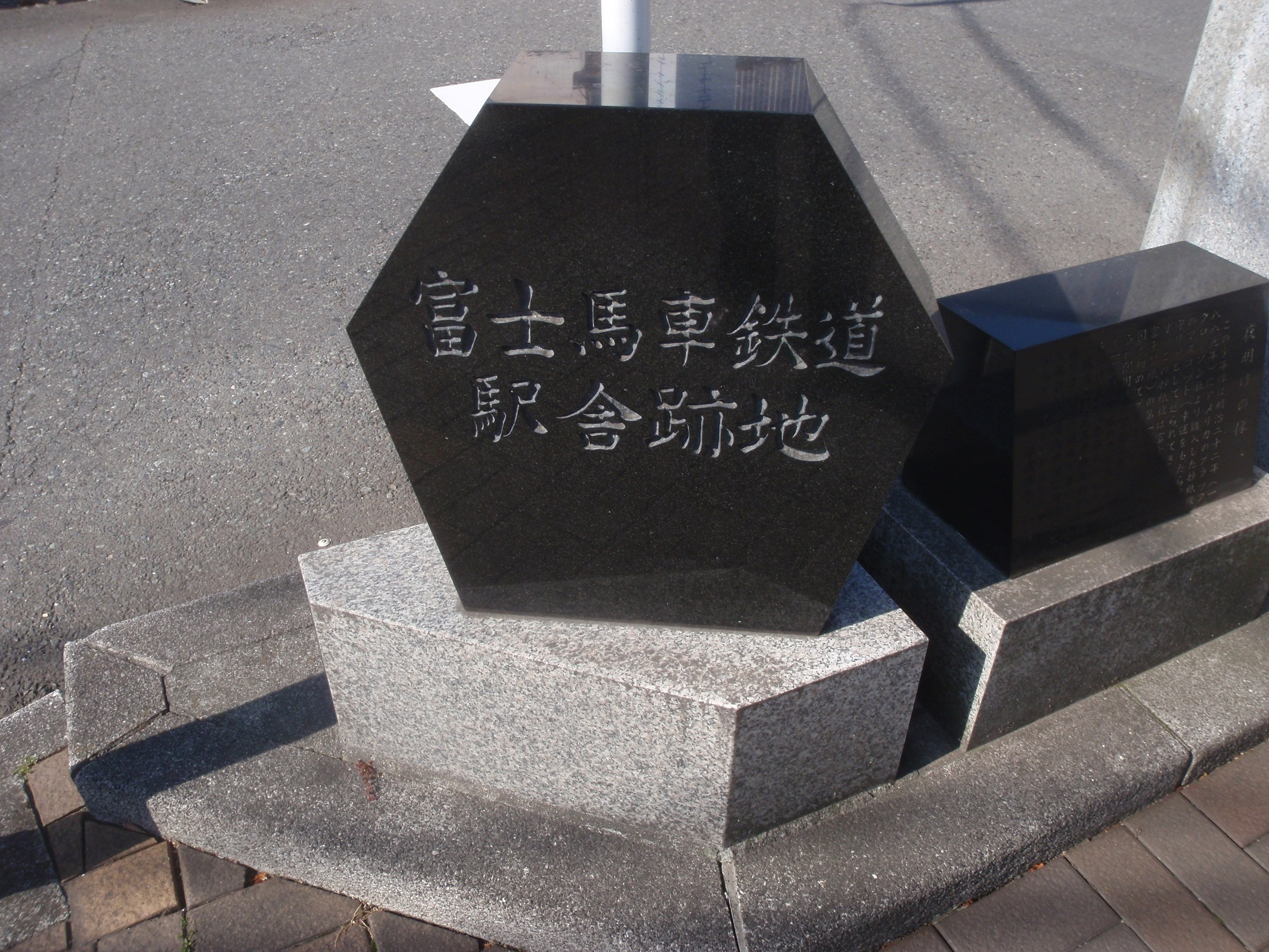 富士馬車鉄道 (I) 駅舎跡地の碑、静岡県富士市鷹岡本町に所在。